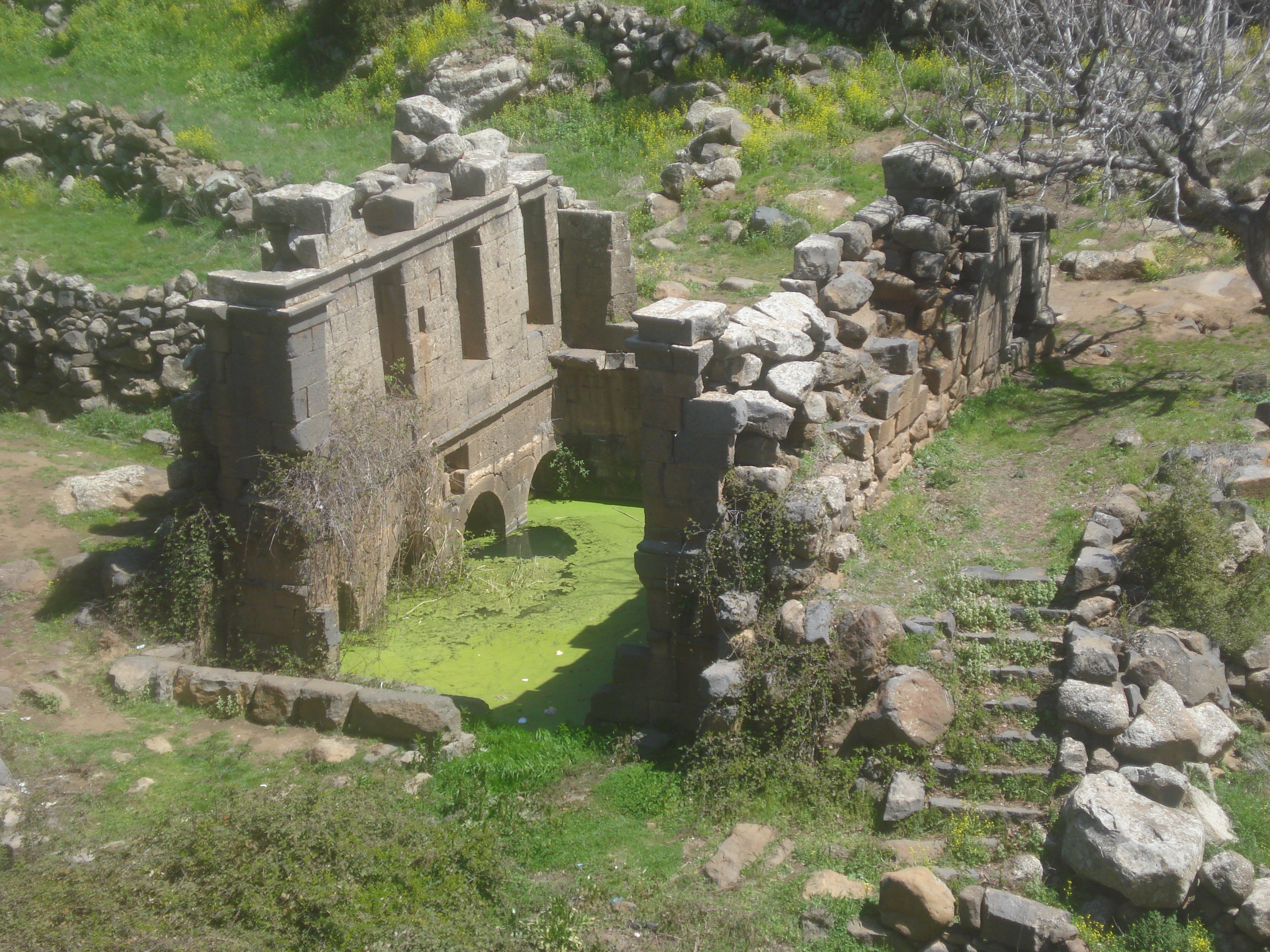 معبد حوريات الماء الروماني ويقع في بلدة قنوات